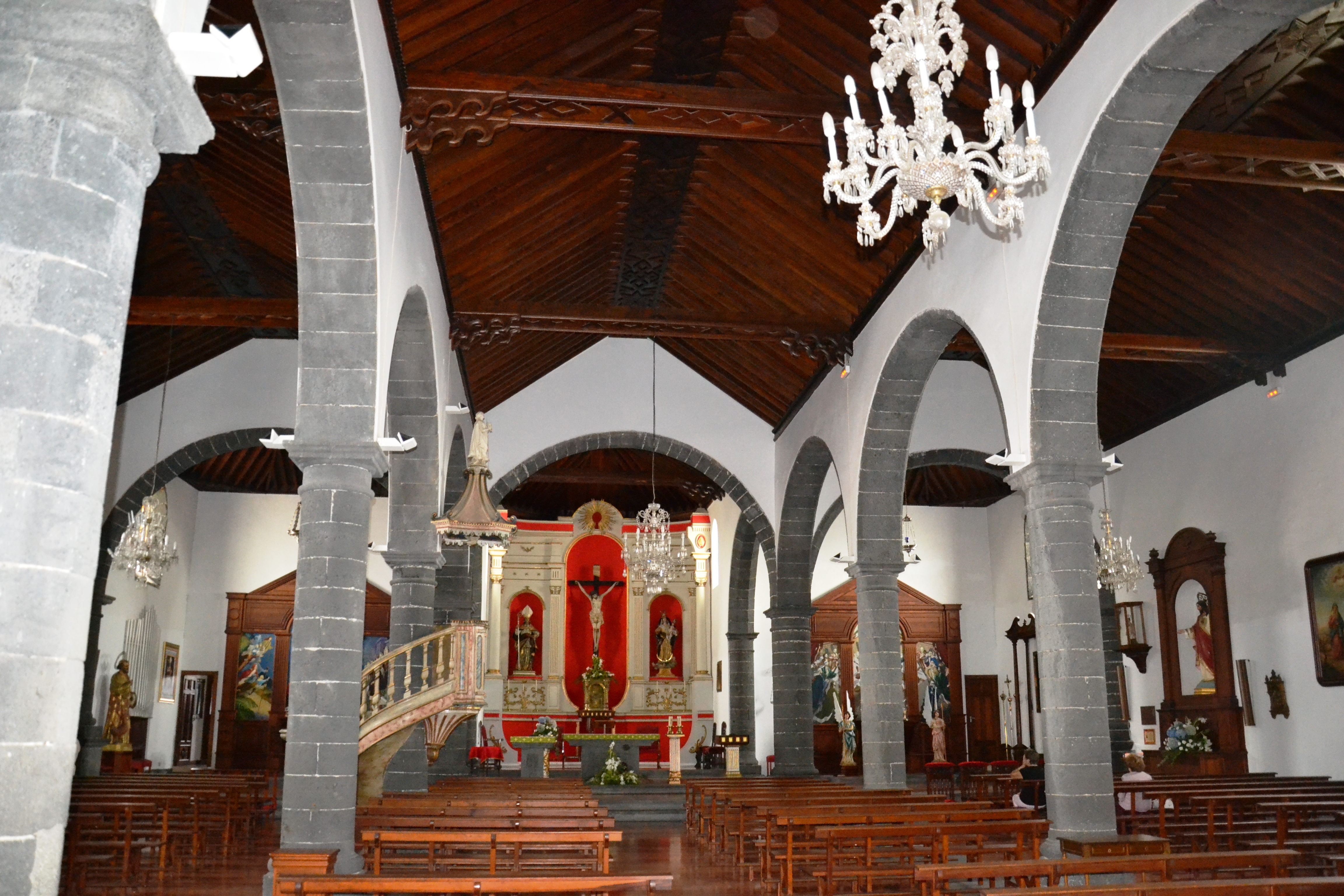 Iglesia de San Ginés, Arrecife, Lanzarote, Kanarische Inseln, Spanien - Innenraum der ältesten Kirche der Insel